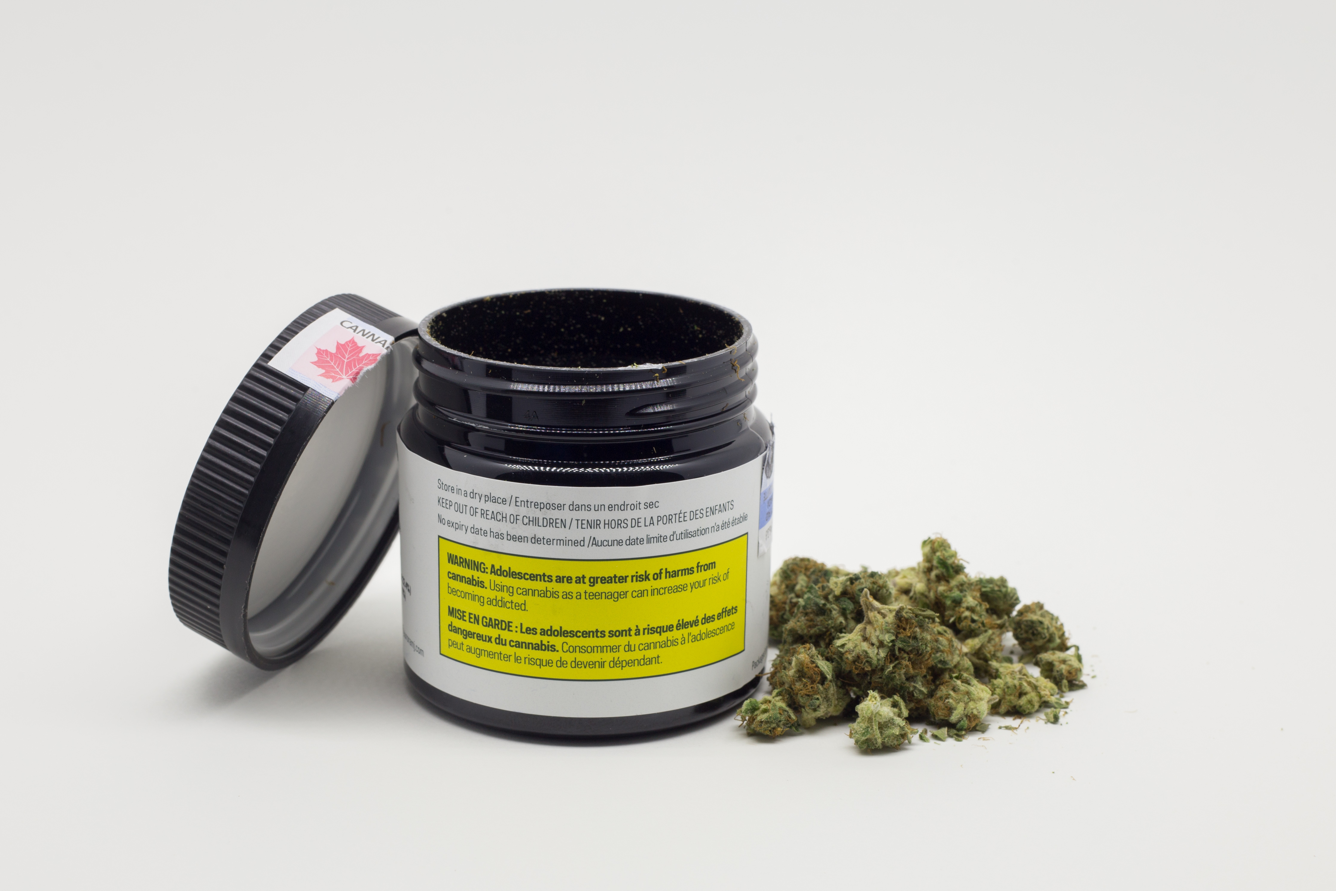 Exemple de produit du cannabis vendu par la Société québécoise du cannabis (SQDC)